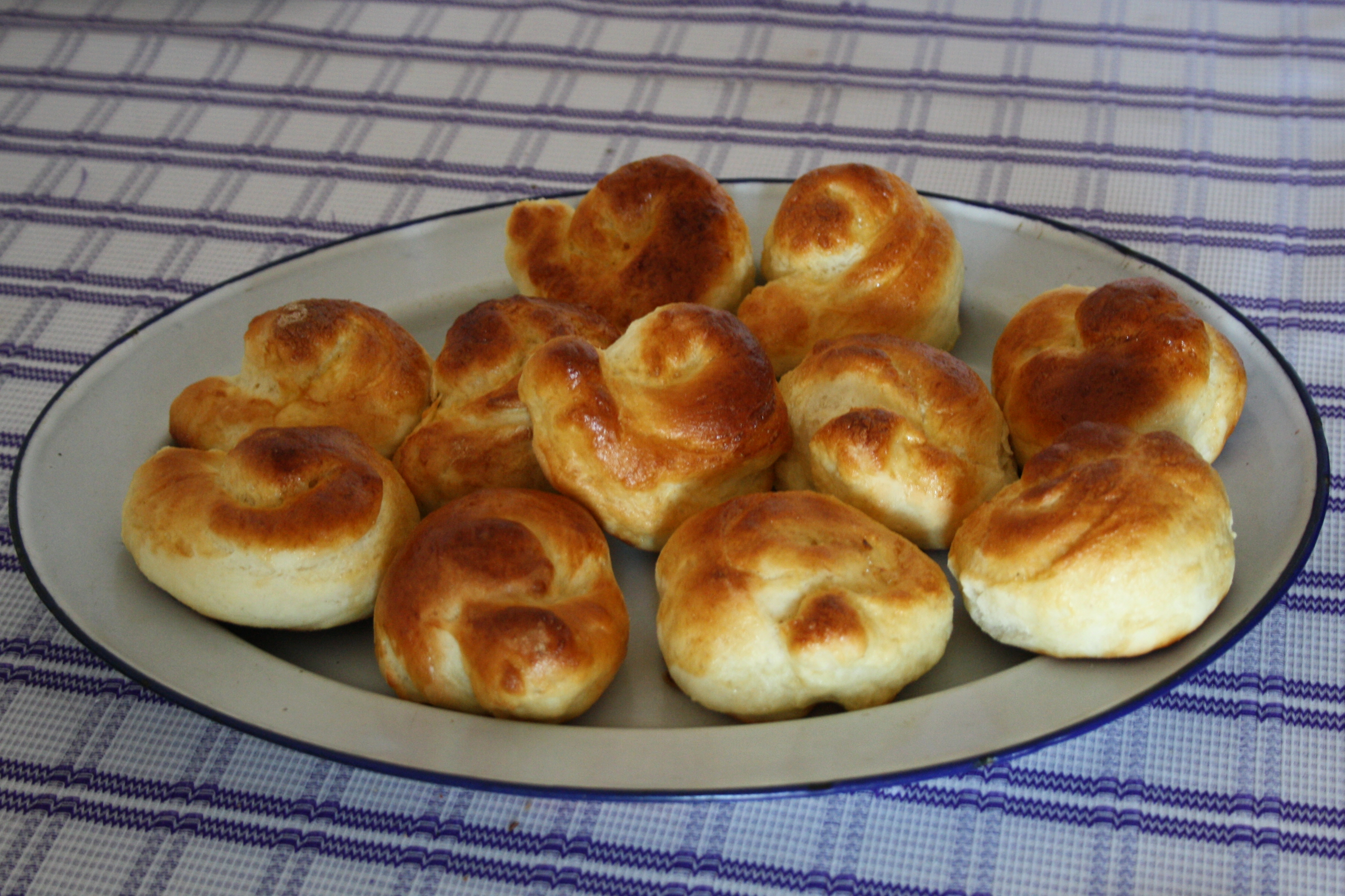 Český velikonoční pokrm zvaný jidáše